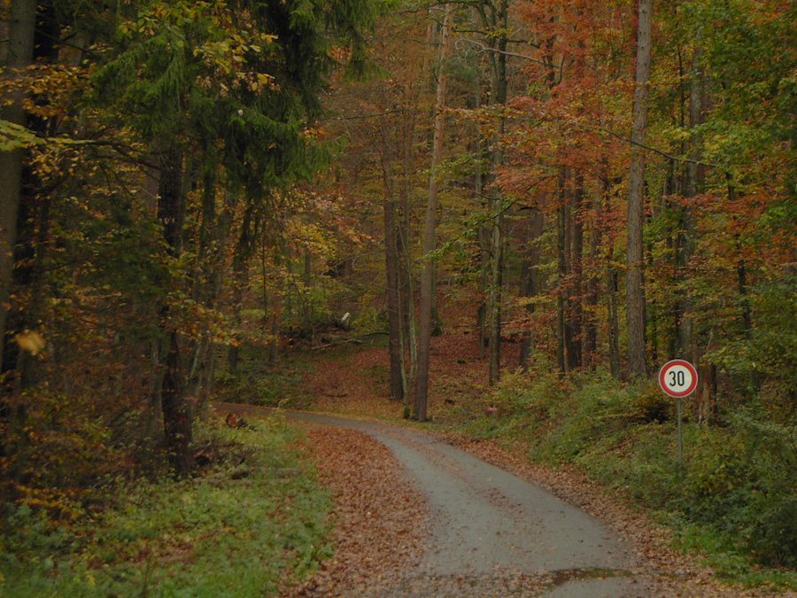 Imagen otoñal tomada en una de las pistas que acceden a Schönbuch.